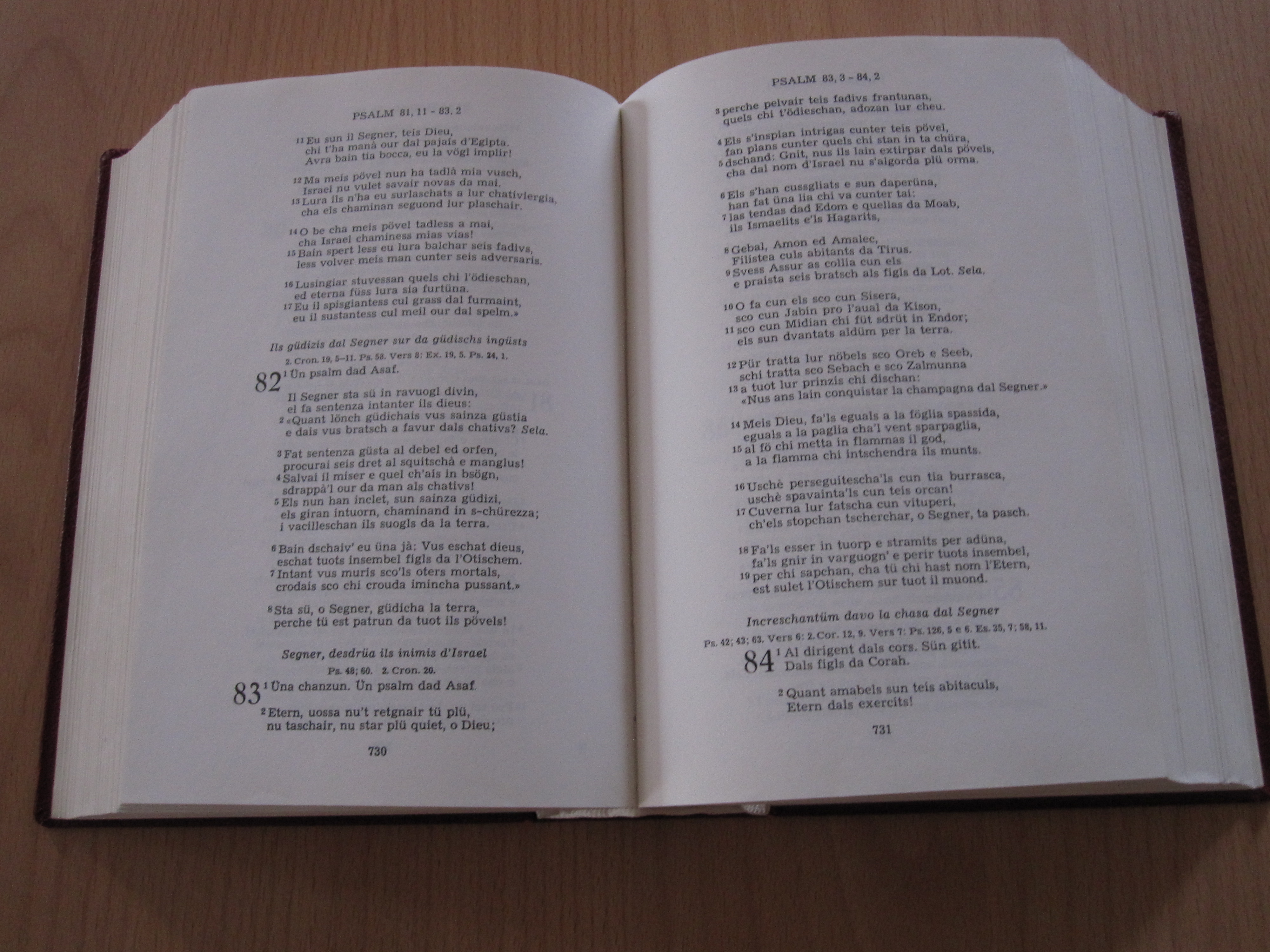 die aufgeschlagene Engadinerbibel, die Soncha Scrittüra